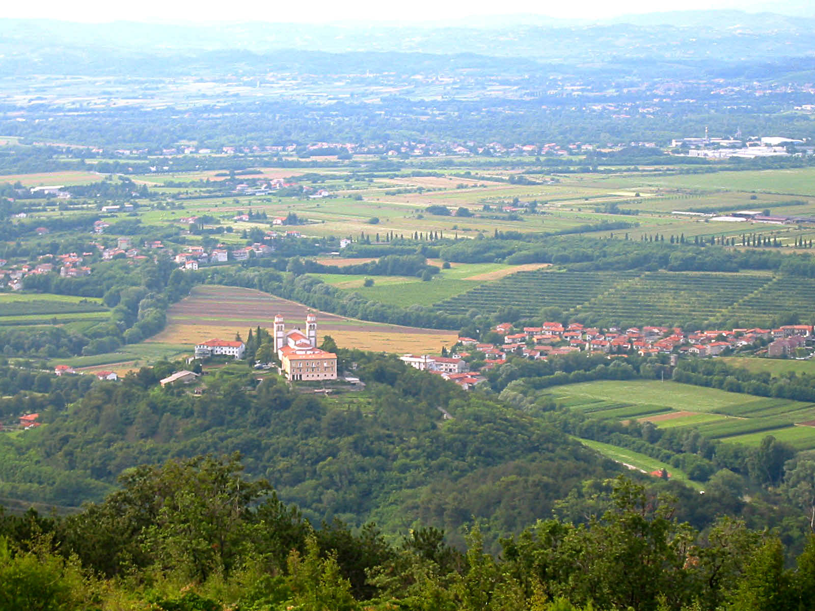 Mirenski grad, Slovenia photo:Ziga 10:24, 13 April 2007 (UTC)